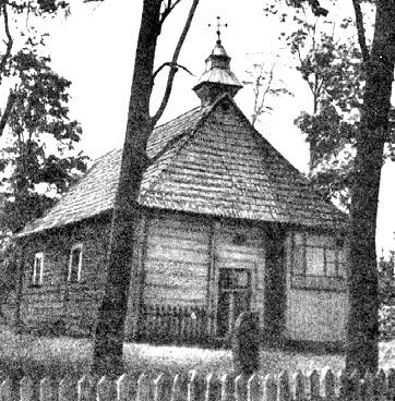 Беларуская (тарашкевіца): Ялова (Jałova). Царква